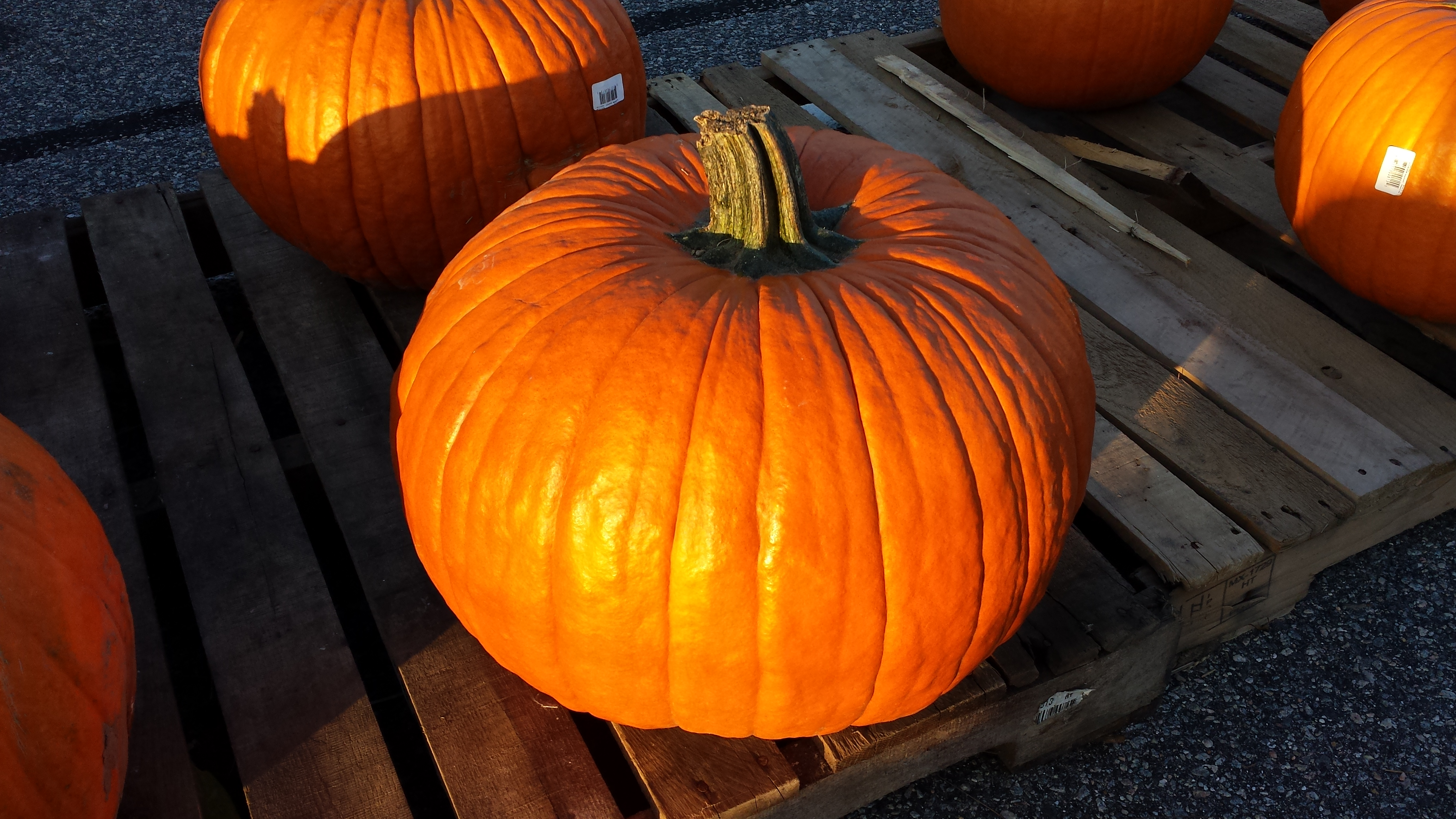 'Connecticut Field' cultivar of Cucurbita pepo